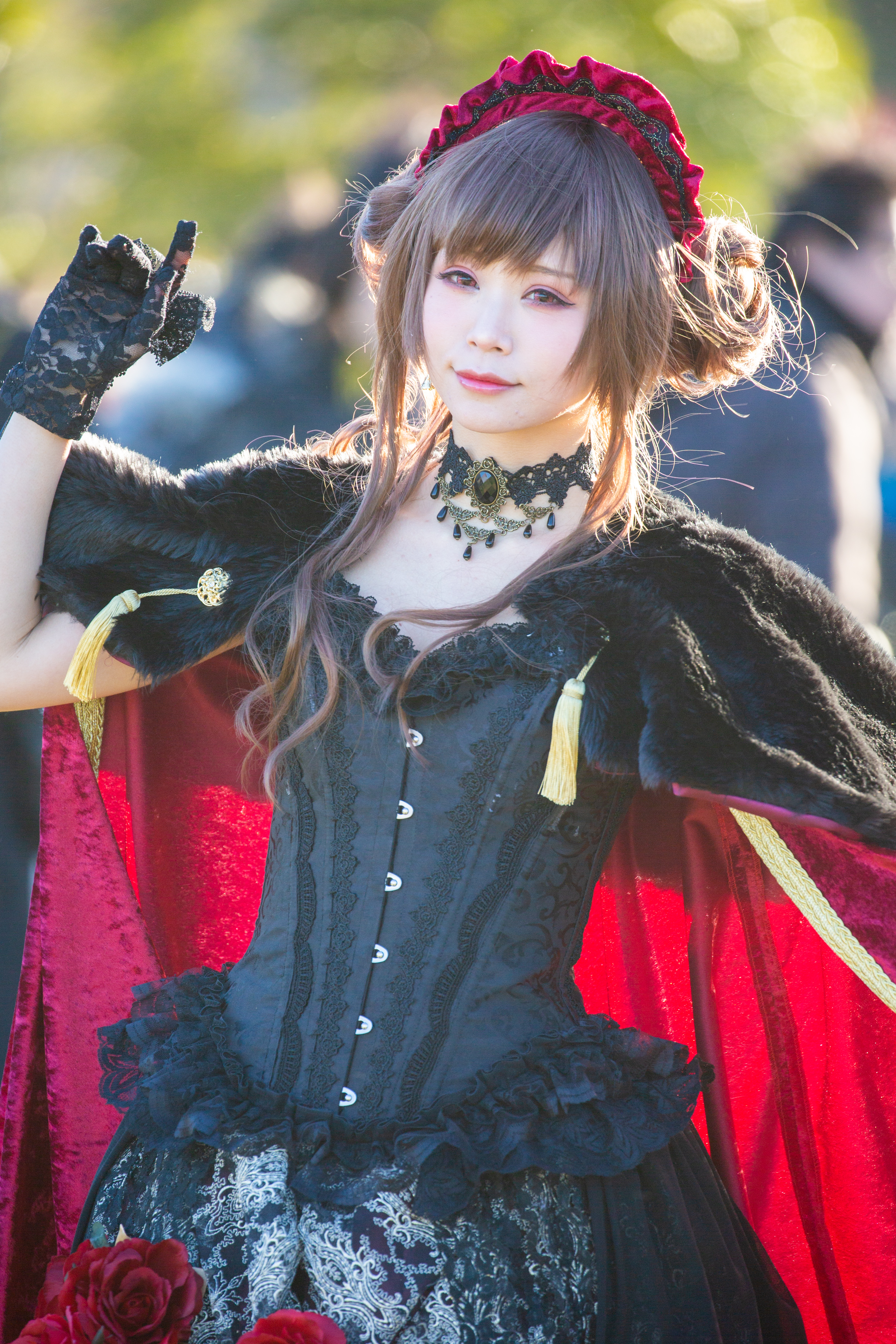 コミックマーケット95 2日目 コスプレイヤー